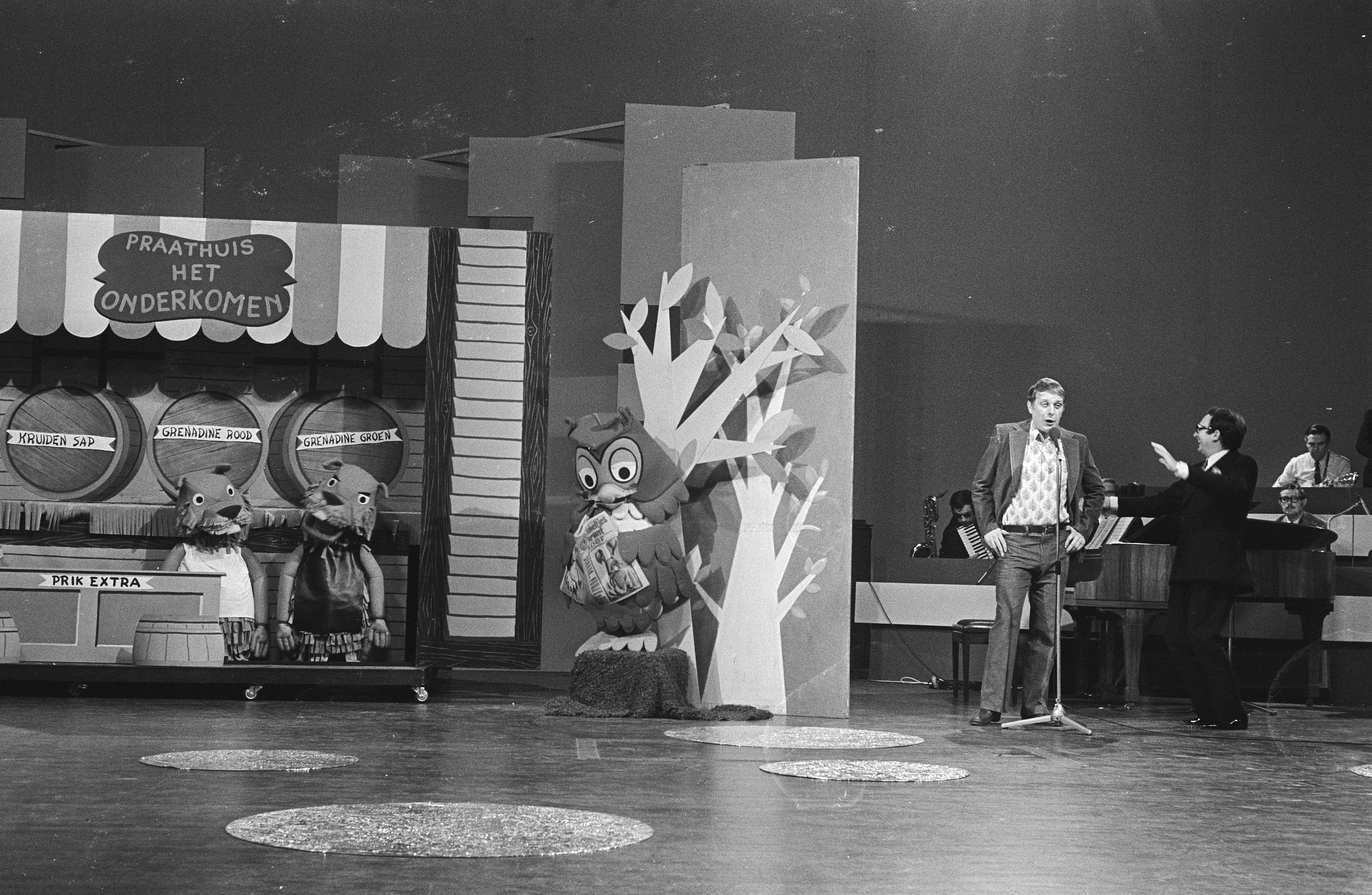 Collectie / Archief : Fotocollectie Anefo Reportage / Serie : [ onbekend ] Beschrijving : Willem Duys reikt Edisons uit in TV-programma "Voor de vuist weg", Ger Smit (links) en Frans van Dusschoten kregen Edison voor Fabeltjeskrant Datum : 26 februari 1971 Trefwoorden : prijsuitreikingen Persoonsnaam : Dusschoten, Frans van, Smits, Ger Instellingsnaam : Edison Fotograaf : Verhoeff, Bert / Anefo Auteursrechthebbende : Nationaal Archief Materiaalsoort : Negatief (zwart/wit) Nummer archiefinventaris : bekijk toegang 2.24.01.05 Bestanddeelnummer : 924-3061